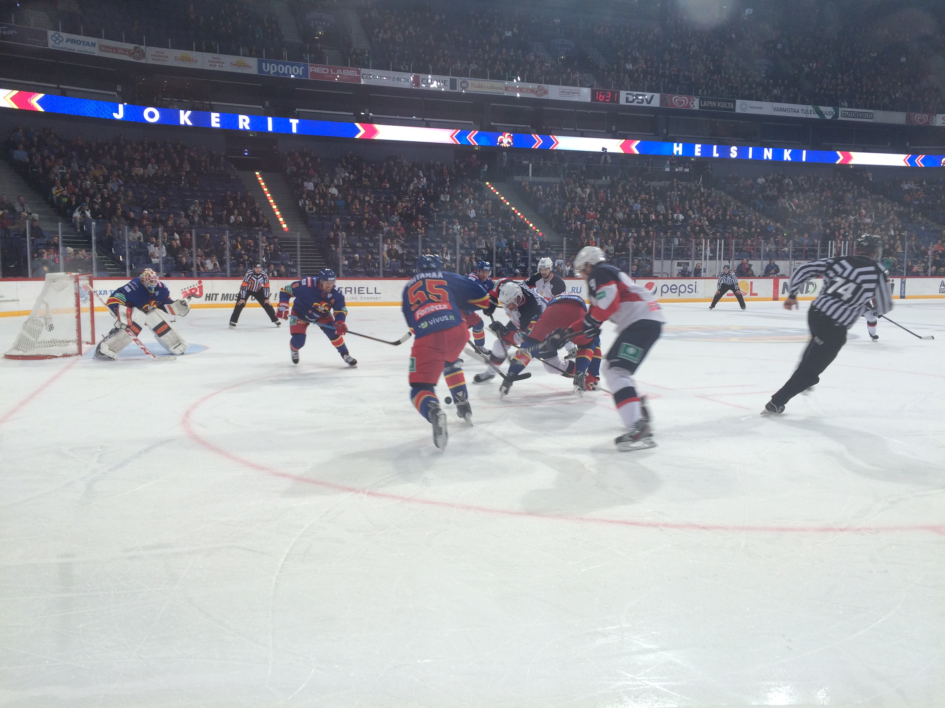 Jokerit vs. Slovan @ Hartwall-areena